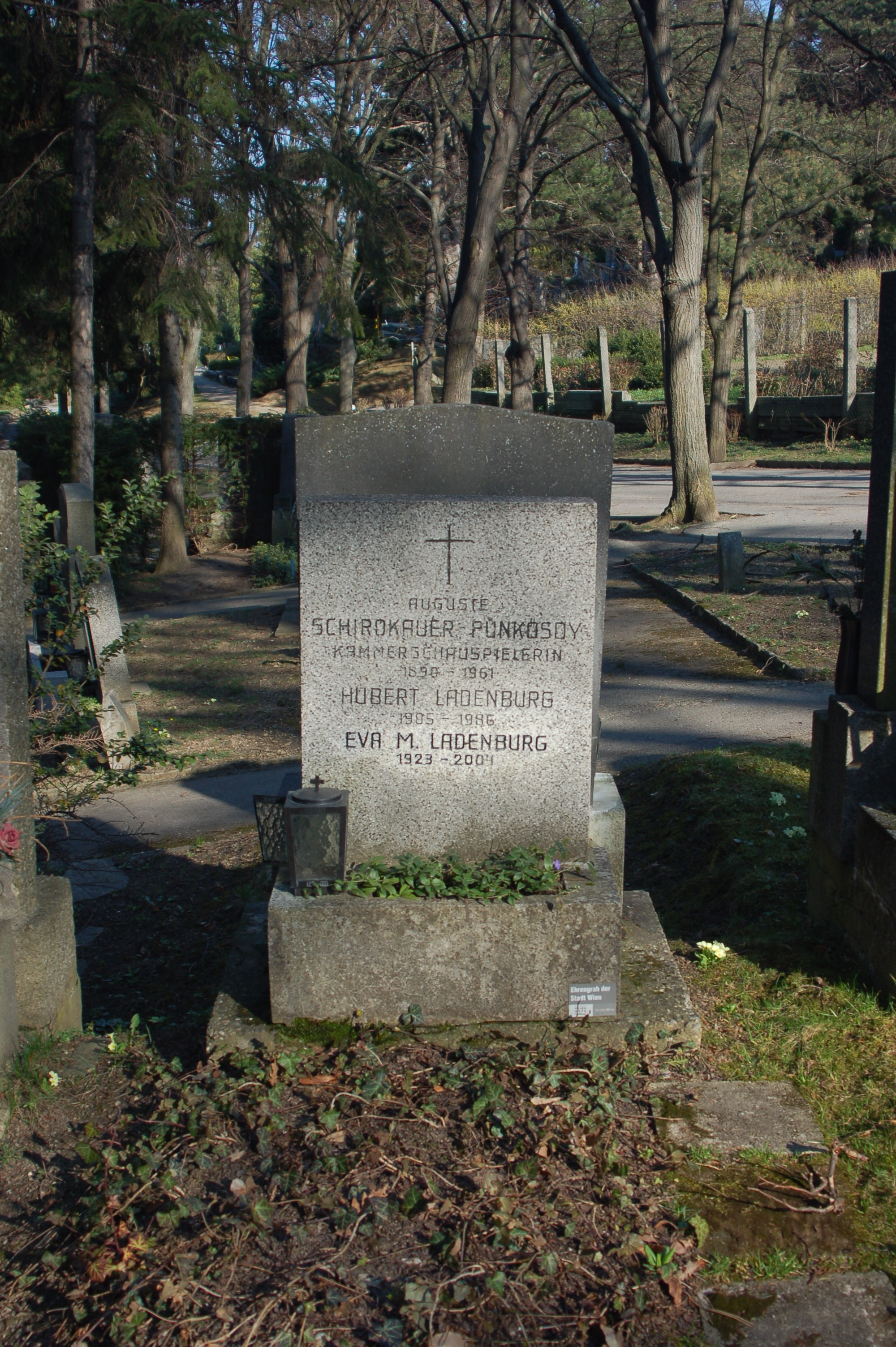 Neustifter Friedhof, Grabstätte von Auguste Schirokauer-Pünkösdy (Ehrengrab der Stadt Wien)